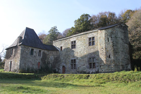 Château de la Roche Guéhennec